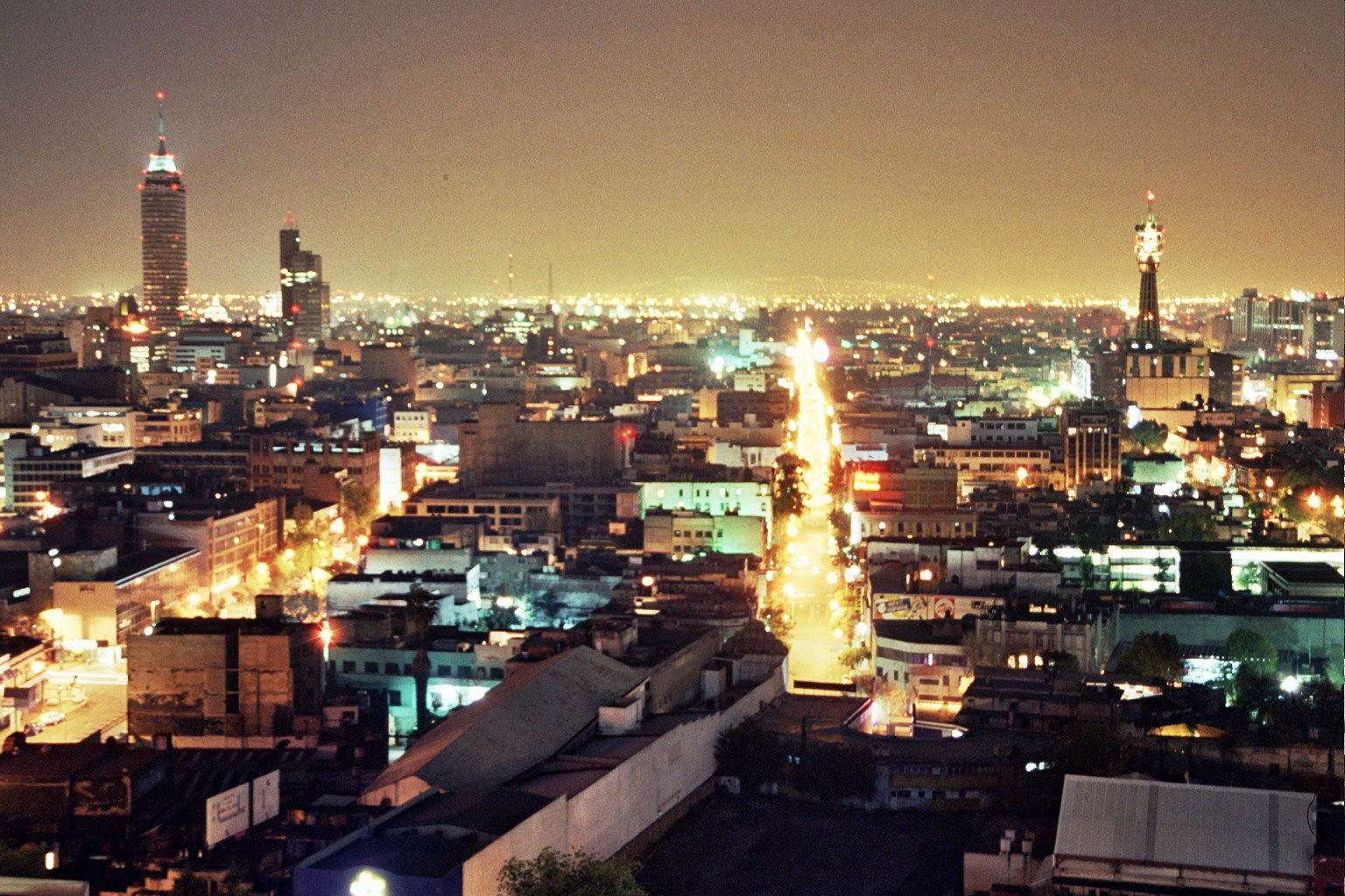 Inmenso. Todavía puedo respirar y oler el humo y ver tililar las luces hasta el horizonte y los helicópteros sobrevolar la ciudad.Ciudad de México de noche